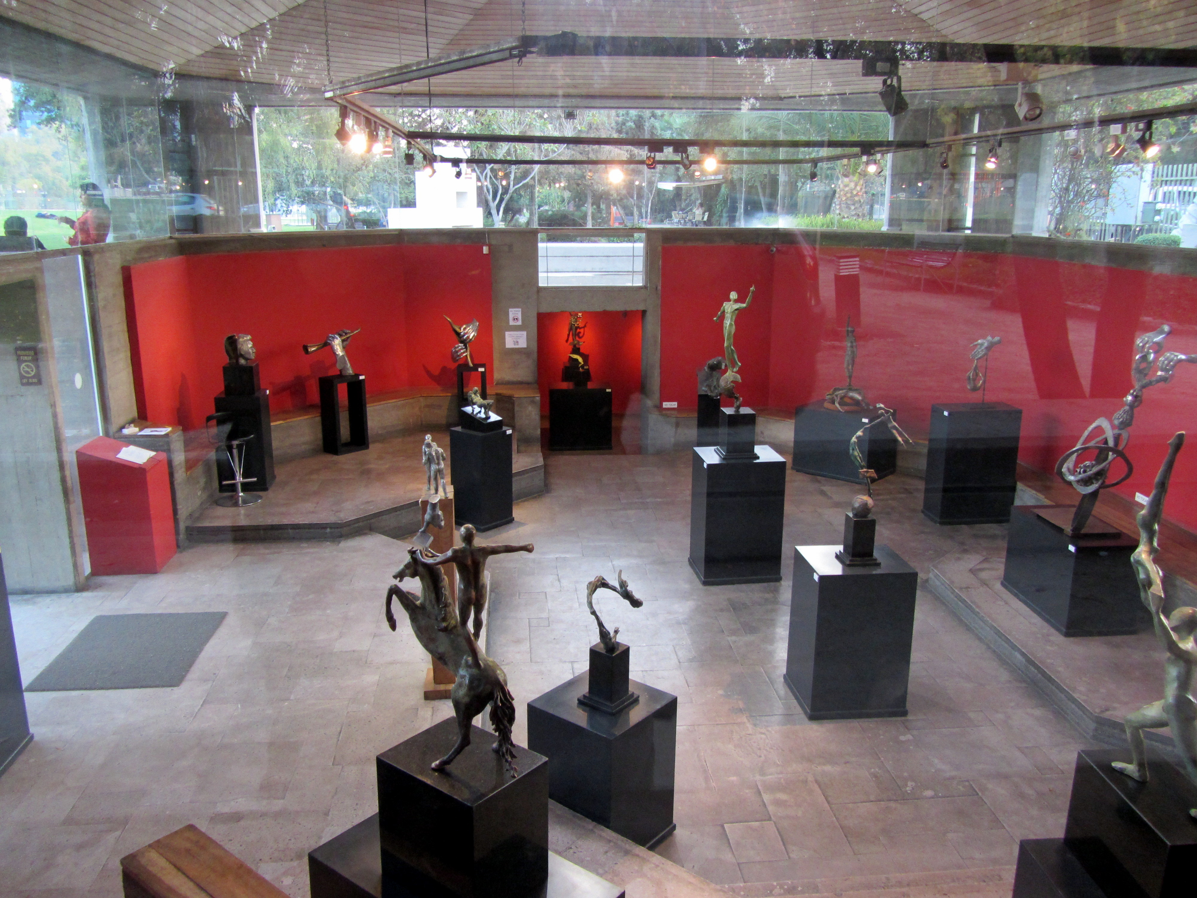 Sala de Exposiones; Parque de las Esculturas de Providencia